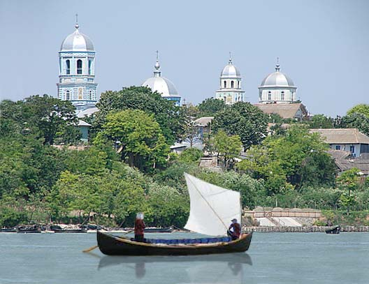 Lotcă cu pânze în fața satului Sarichioi în 1999